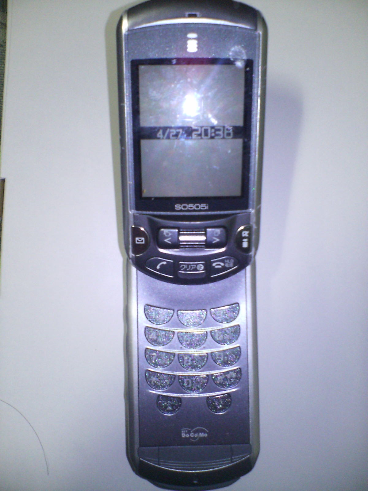 NTT DoCoMo mova So505i(Open)